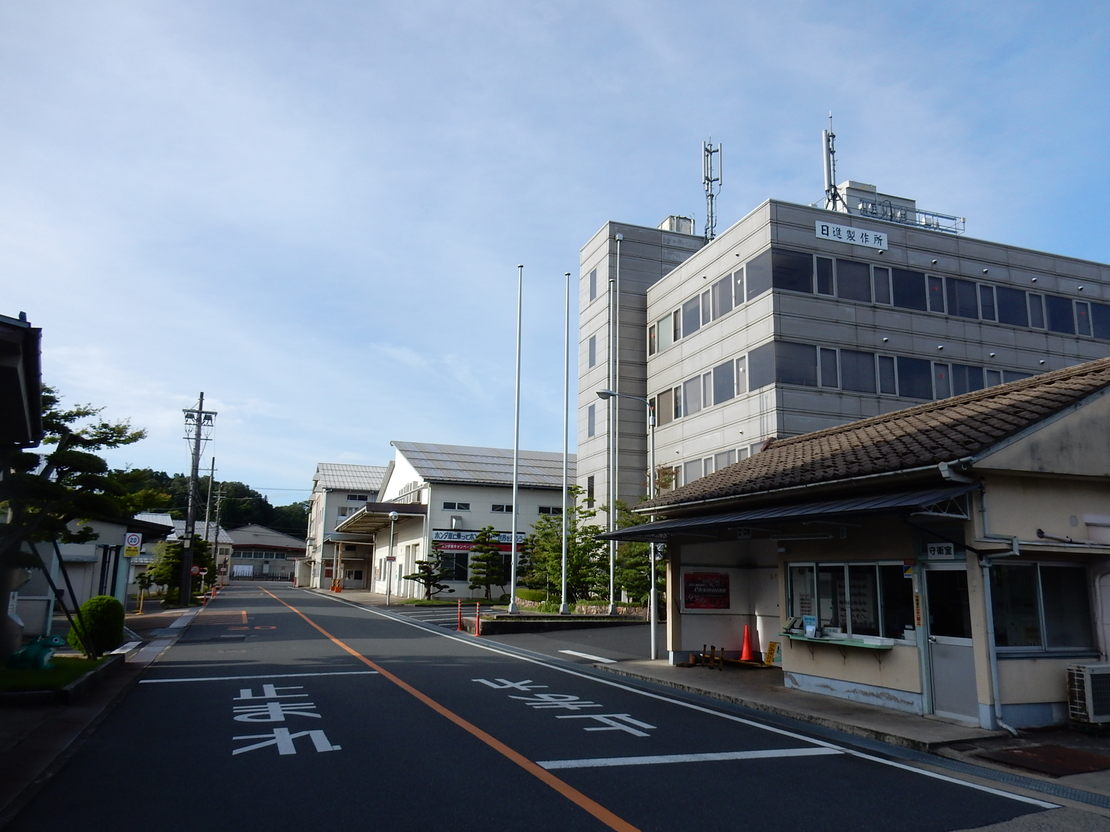 株式会社日進製作所本社（京都府京丹後市峰山町千歳）